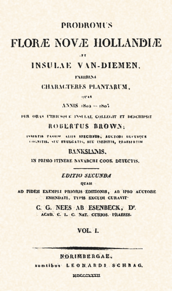 Sujet : Couverture de Prodromus de Robert Brown. Source : couverture de l'édition de 1810, illustration du domaine publique. Licence